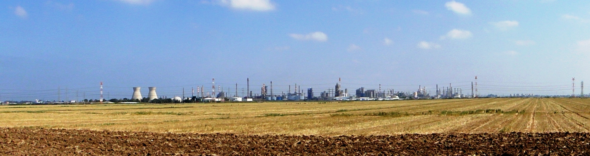 Haifa oil refineries-panoramic viee תמונה פנורמית של בתי הזיקוק חיפה, מבט לכוון צפון מכביש 75 בתי הזיקוק בחיפה ומפעלים פטרוכימיים מימינם